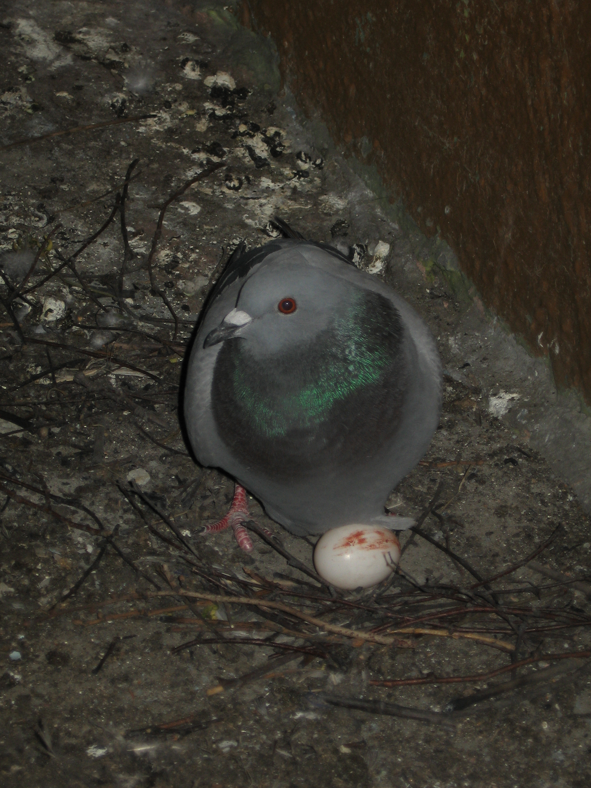 Samička holuba skalního sedí na vejci